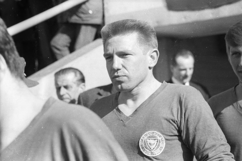 Fußballspieler von Holstein Kiel in der Saison 1966/1967.